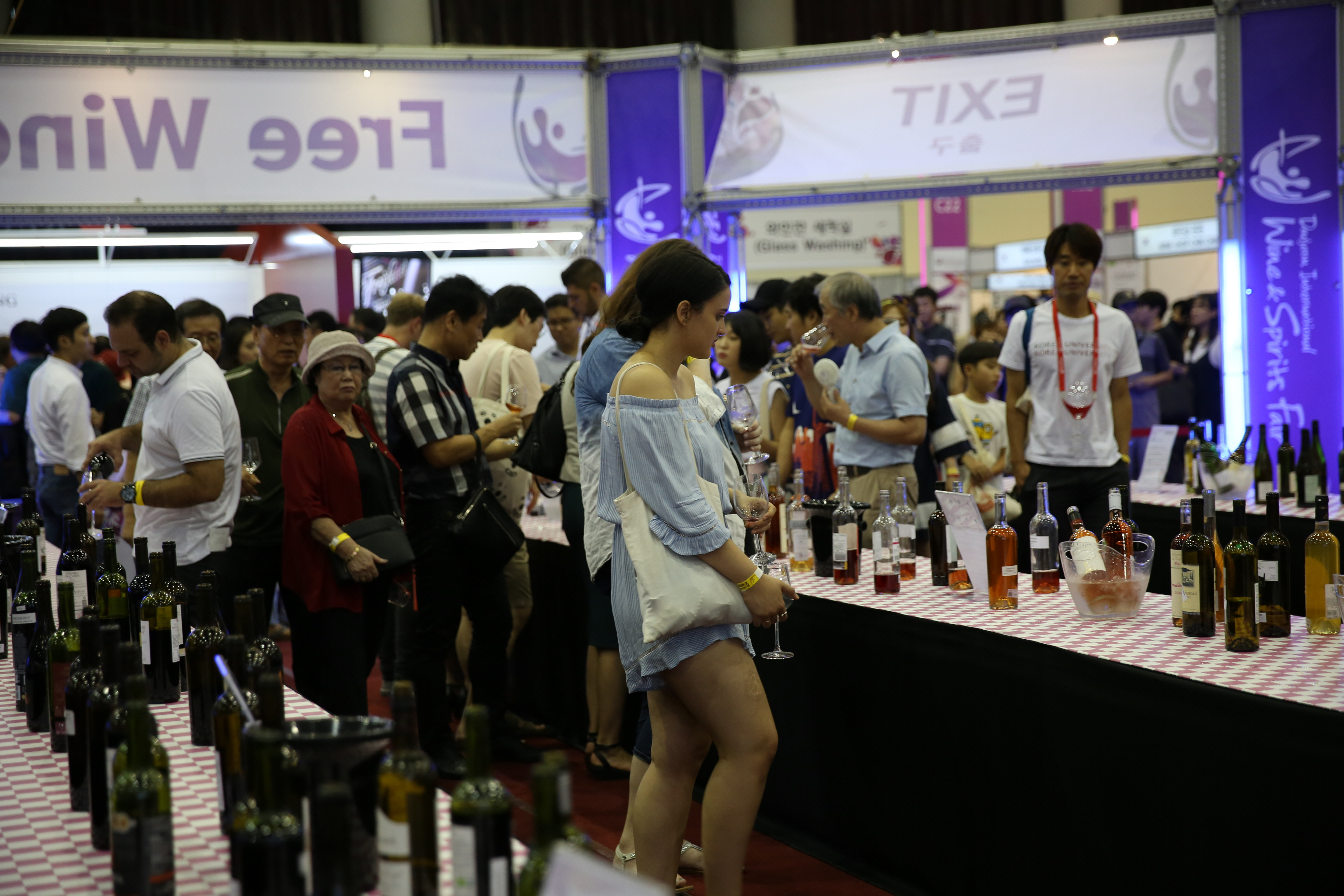 2018 대전국제와인페스티벌 2